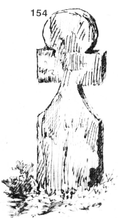 154 Кръст-кукла из гробищата на с. Добревци, Тетевенска околия. Изработена от дъбова дъска преди 10-15 години; главата и е кръгла, страничните крила са четвъртити и широки, долното се стеснява силно към страничните крила. Размери: 30x14x3 см. Скицирана на 19.VII.1916 г. (Т. 6, обр. 59.)